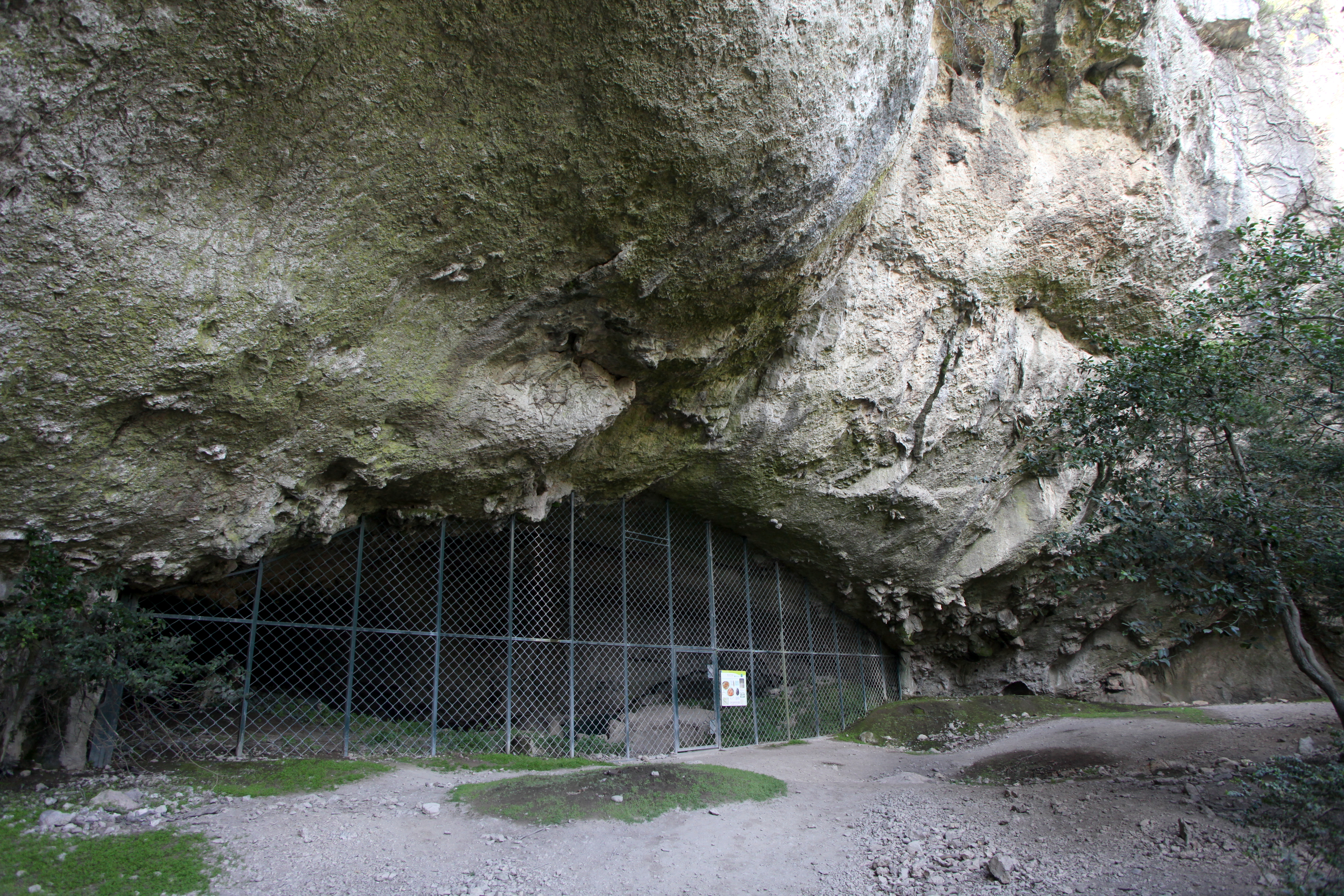 Porche d'entrée de la Baume (grotte) d'Oulen dans les gorges de l'Ardèche.